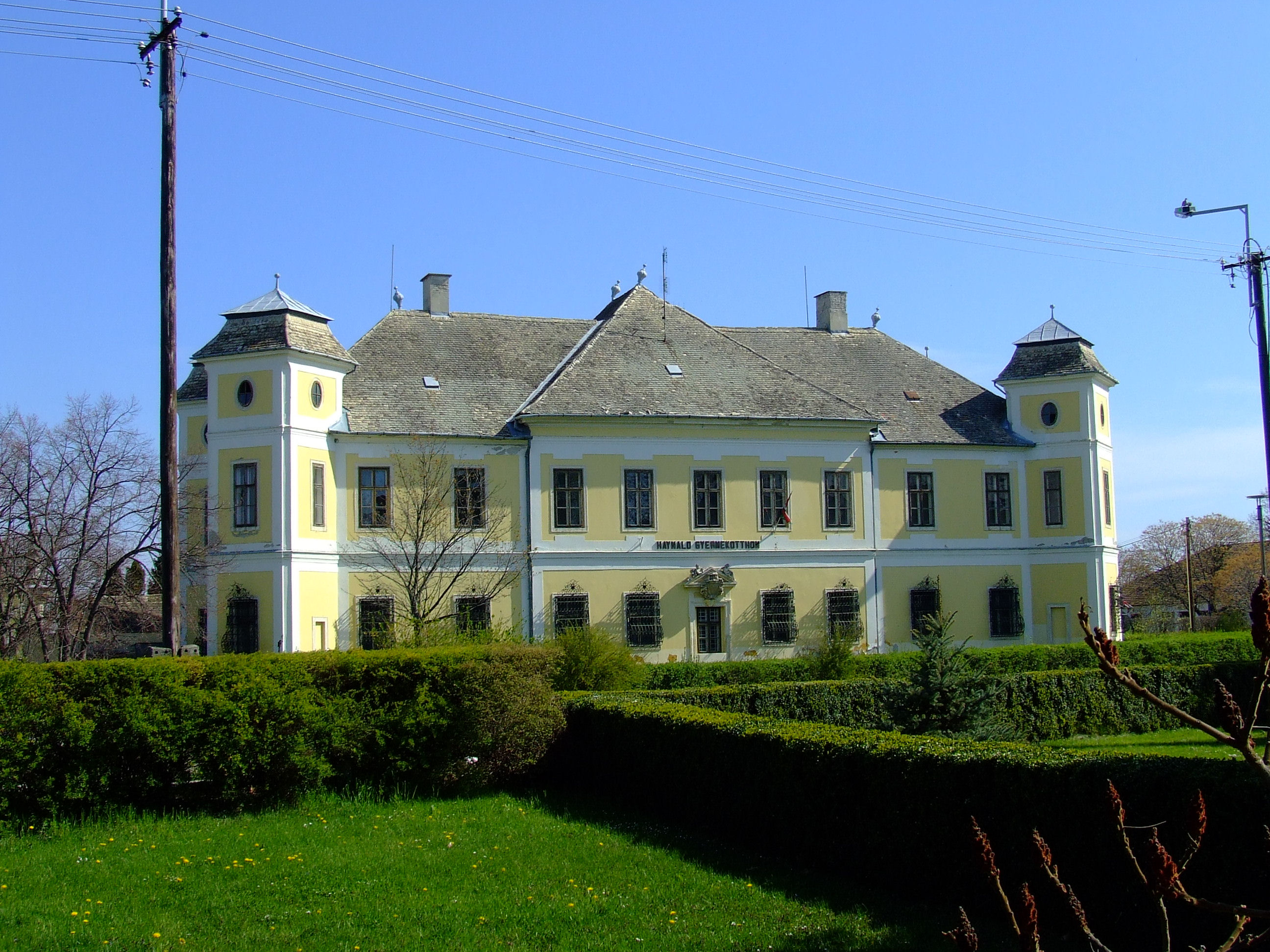 A hajósi érseki kastély. Építette a kalocsai érsek 1739-ben